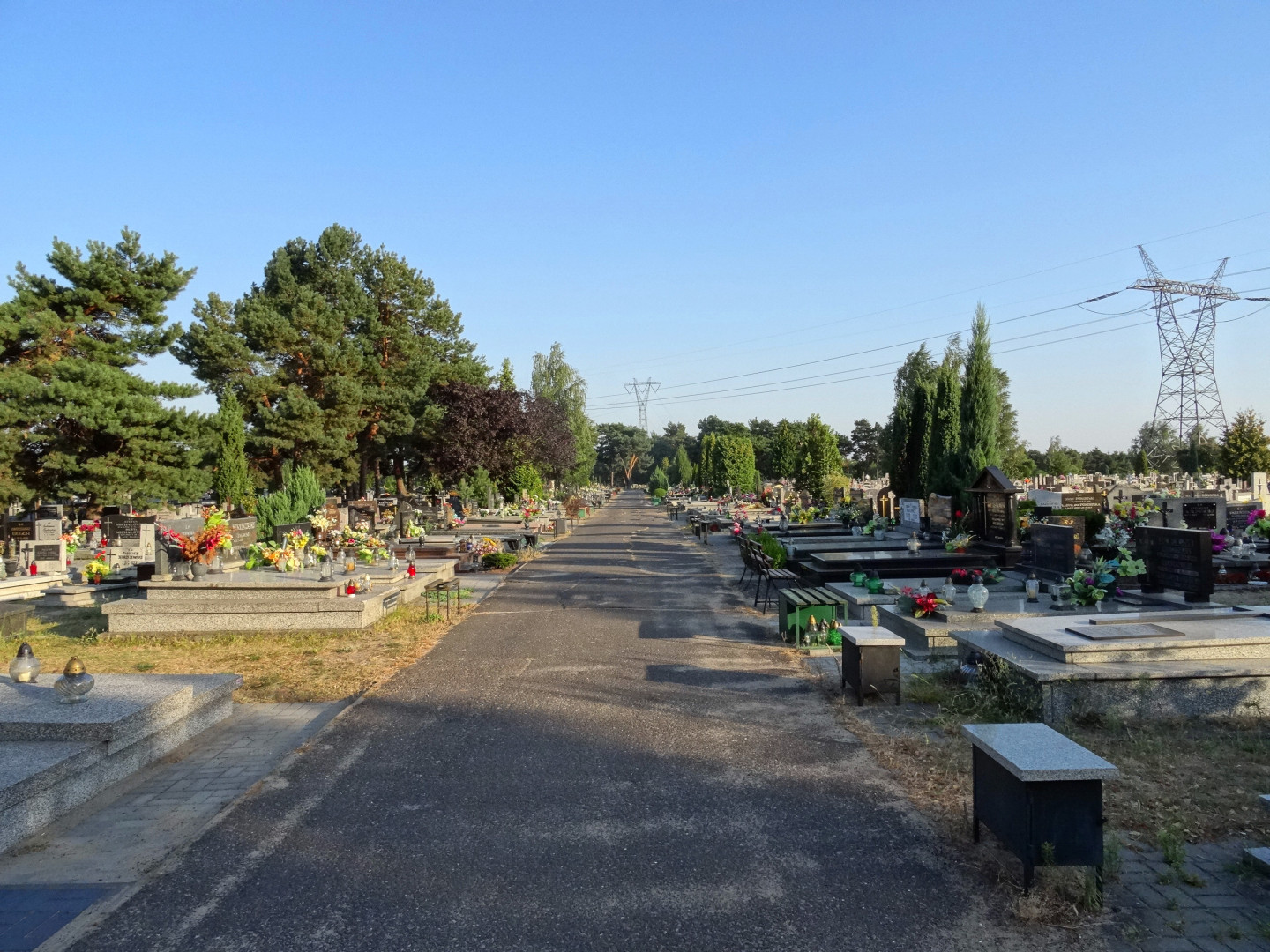 Cmentarz Komunalny przy ul. Wiślanej w Bydgoszczy